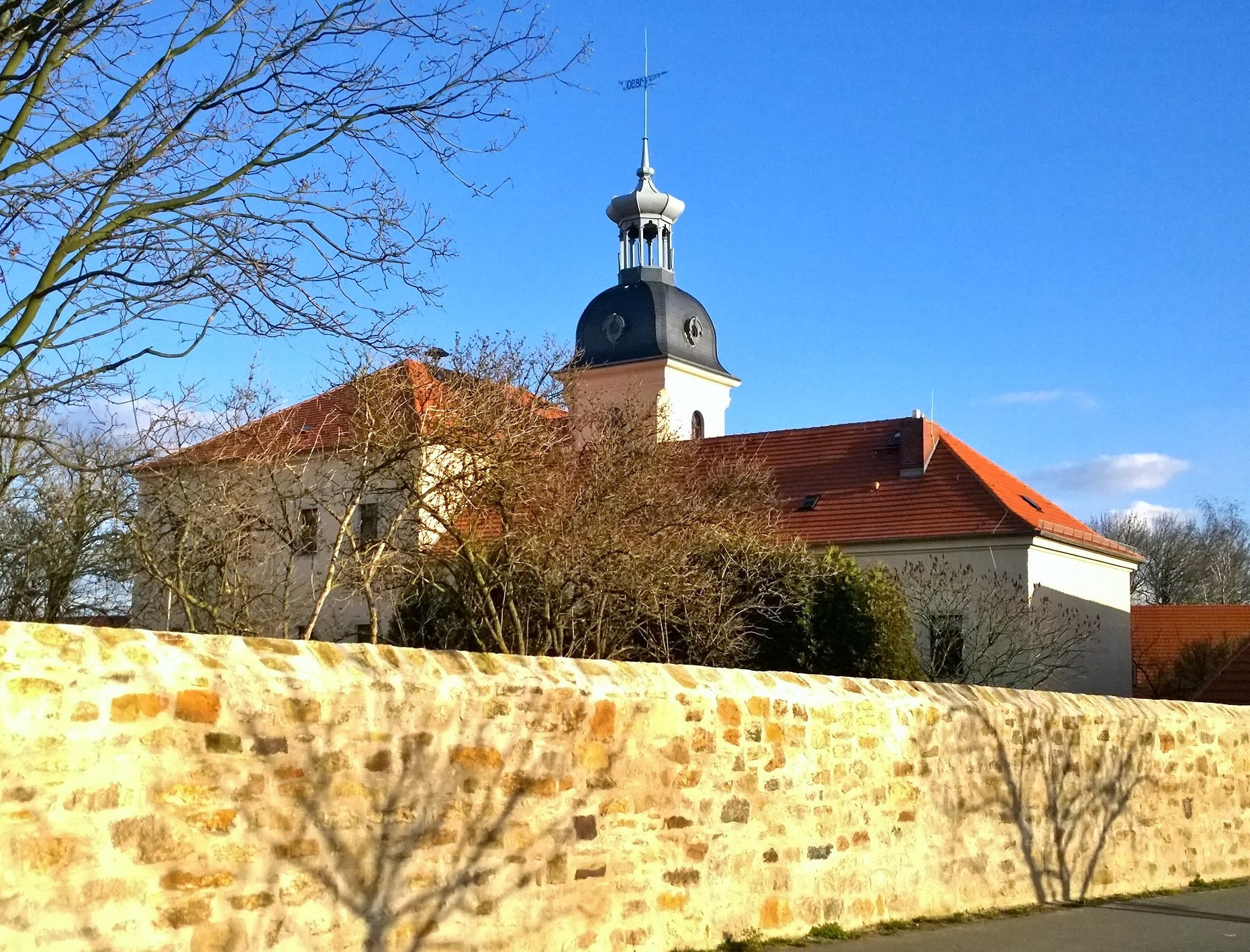 Schloss Röhrsdorf: Blick von Westen nach Südosten auf das Schlossgebäude hinter der Umfassungsmauer